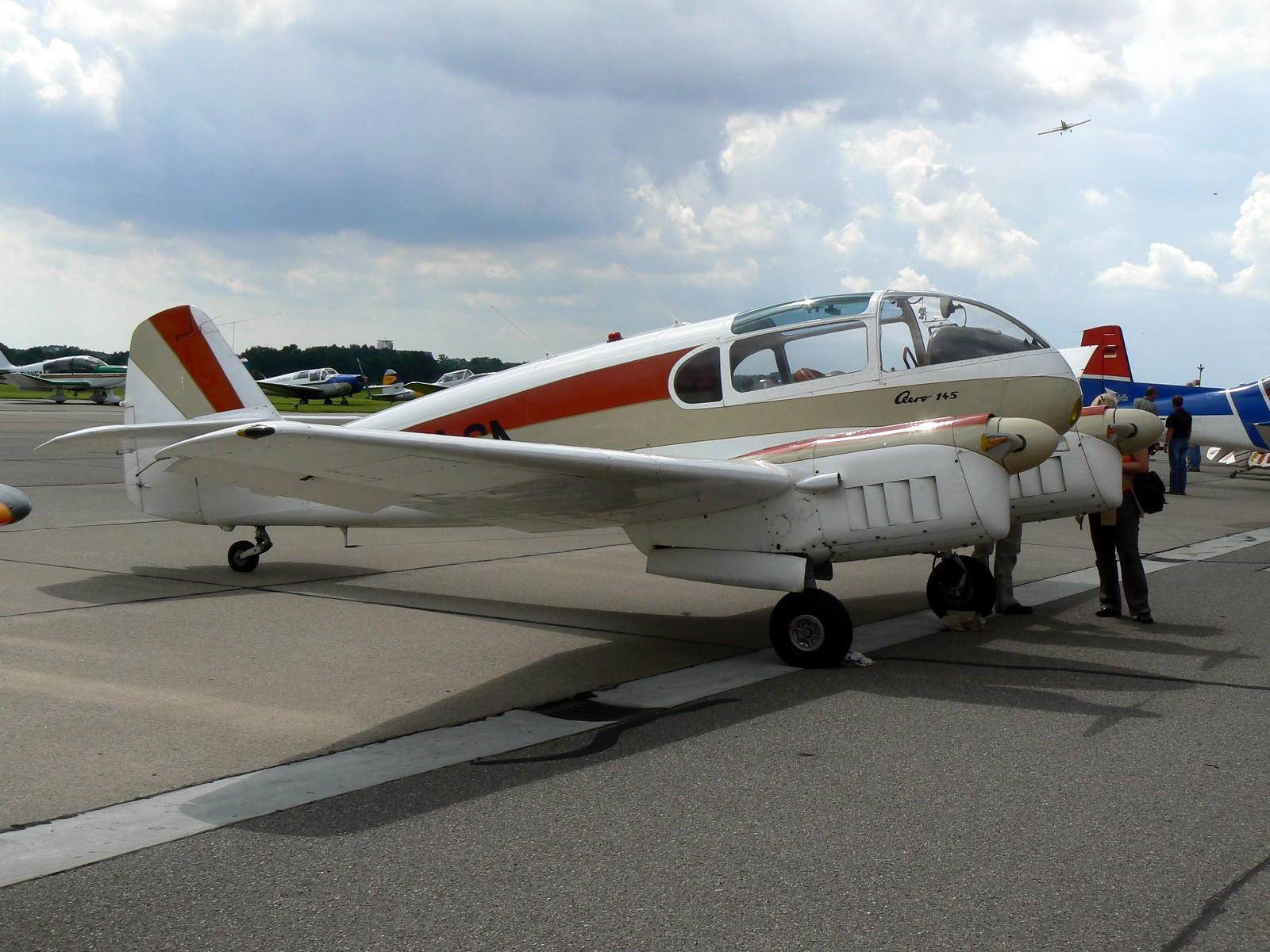 Flugzeug Aero Ae-145 (Baujahr 1959) bei den Internationalen Flugtagen Kiel 2007.